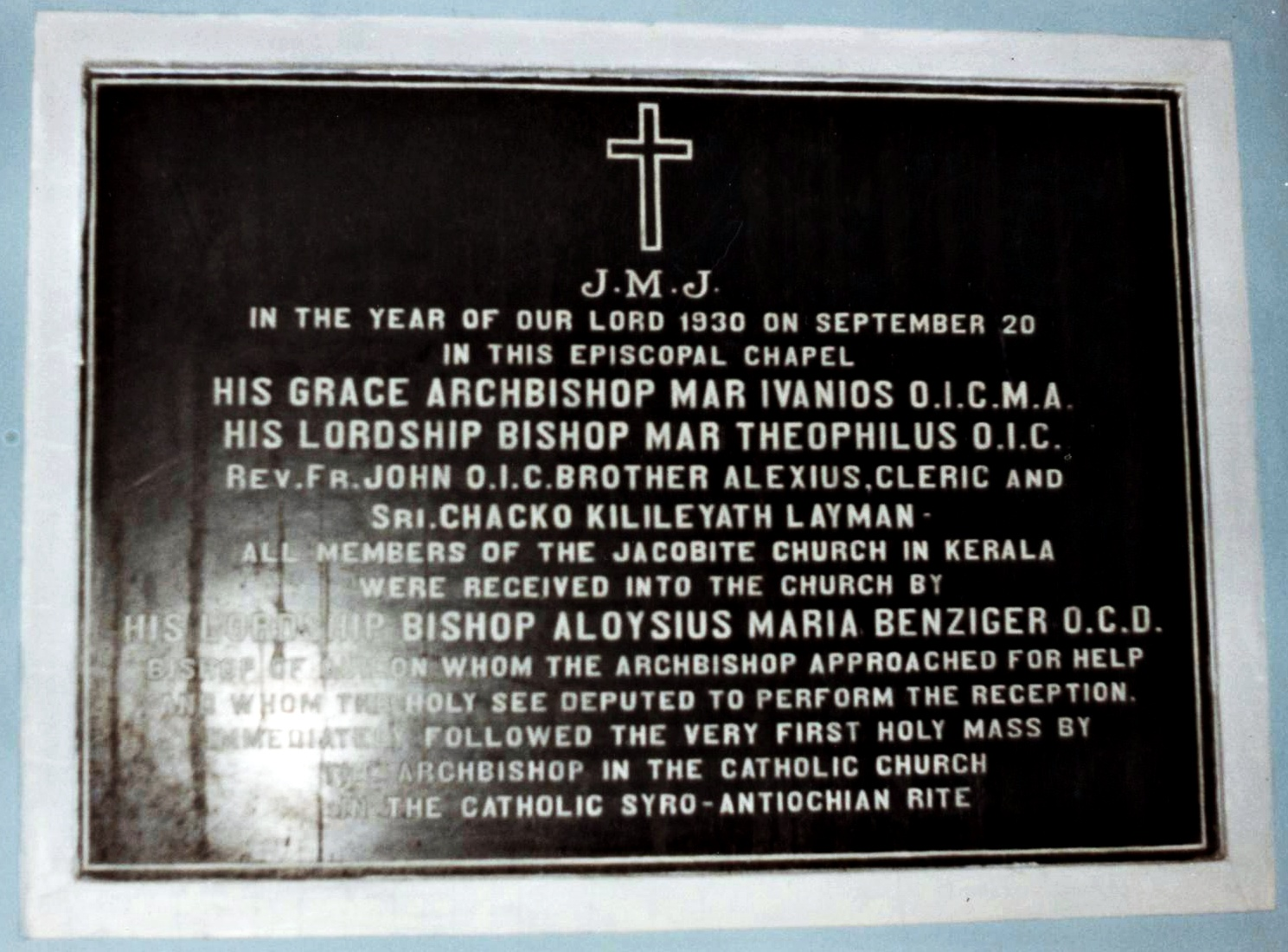 Quilon, Kerala, Indien, Bischofskapell, Gedenkstein zur Erinnerung an die Gründung des syro-malankarischen Ritus, 1930